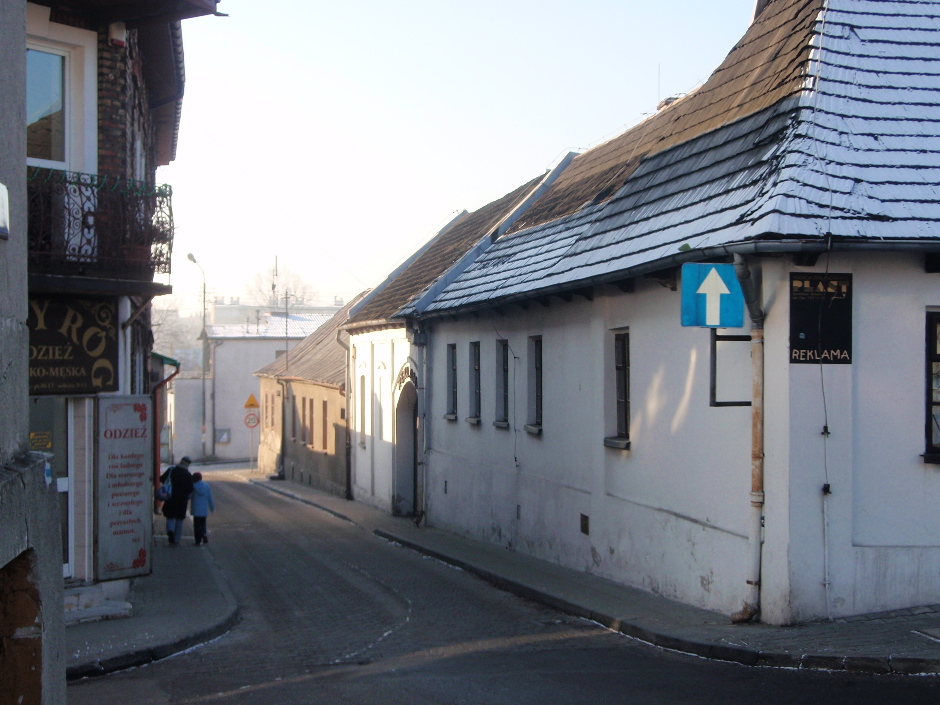 Sławków, woj. śląskie - ul. Krakowska